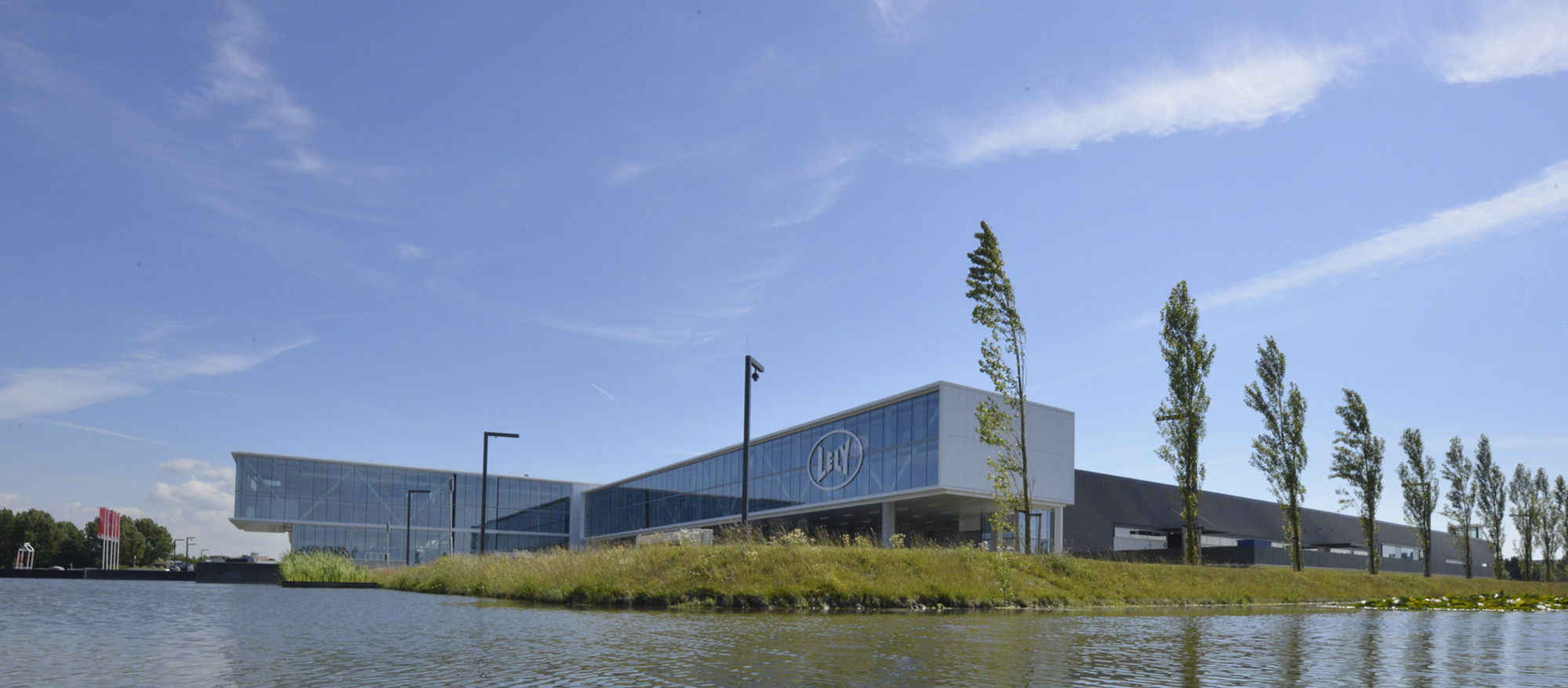 Lely Campus te Maassluis